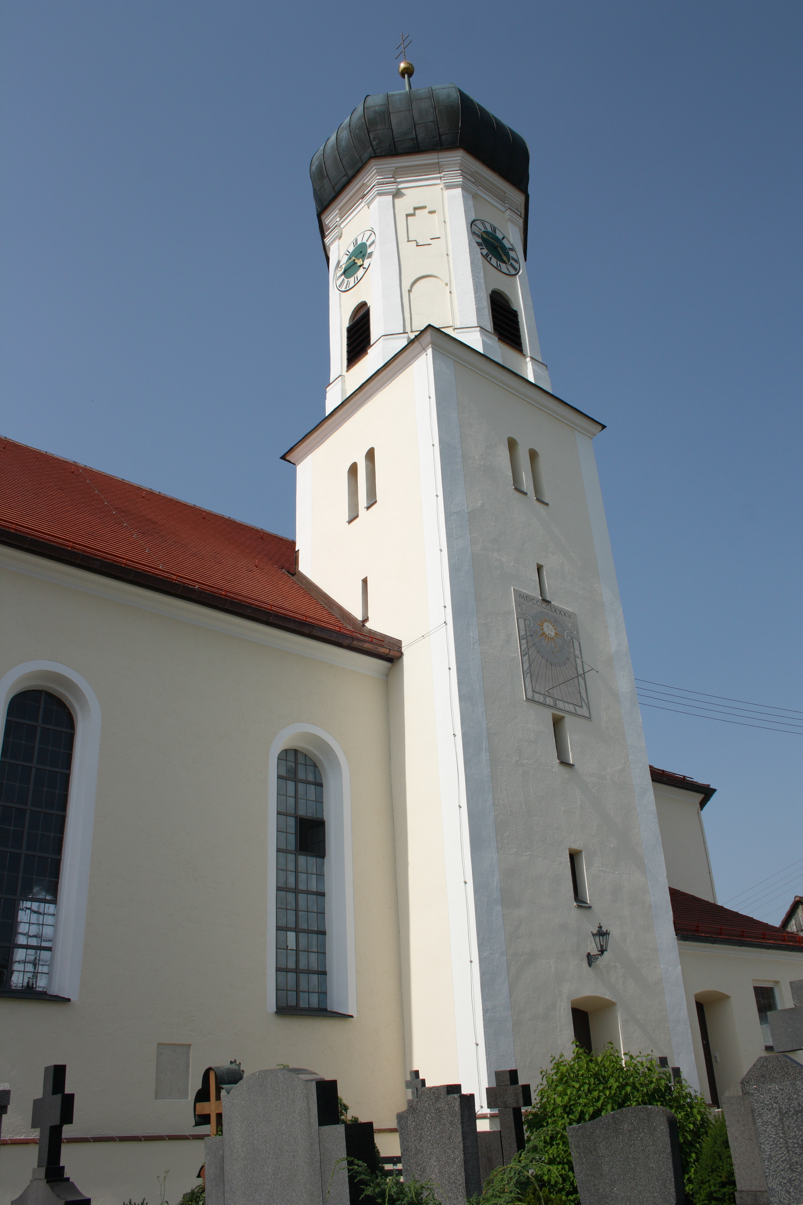 Katholische Pfarrkirche St. Martin in Rieden an der Kötz, einem Stadtteil von Ichenhausen im Landkreis Günzburg (Bayern), Neubau 1847/48 mit Zwiebelturm des 18. Jahrhunderts